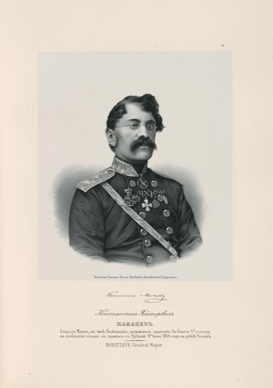 генерал-майор Константин Христофорович Мамацев